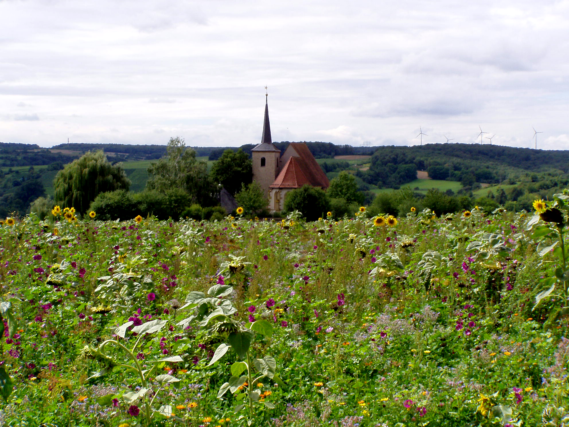 Die Hohenfelder Bergkirche